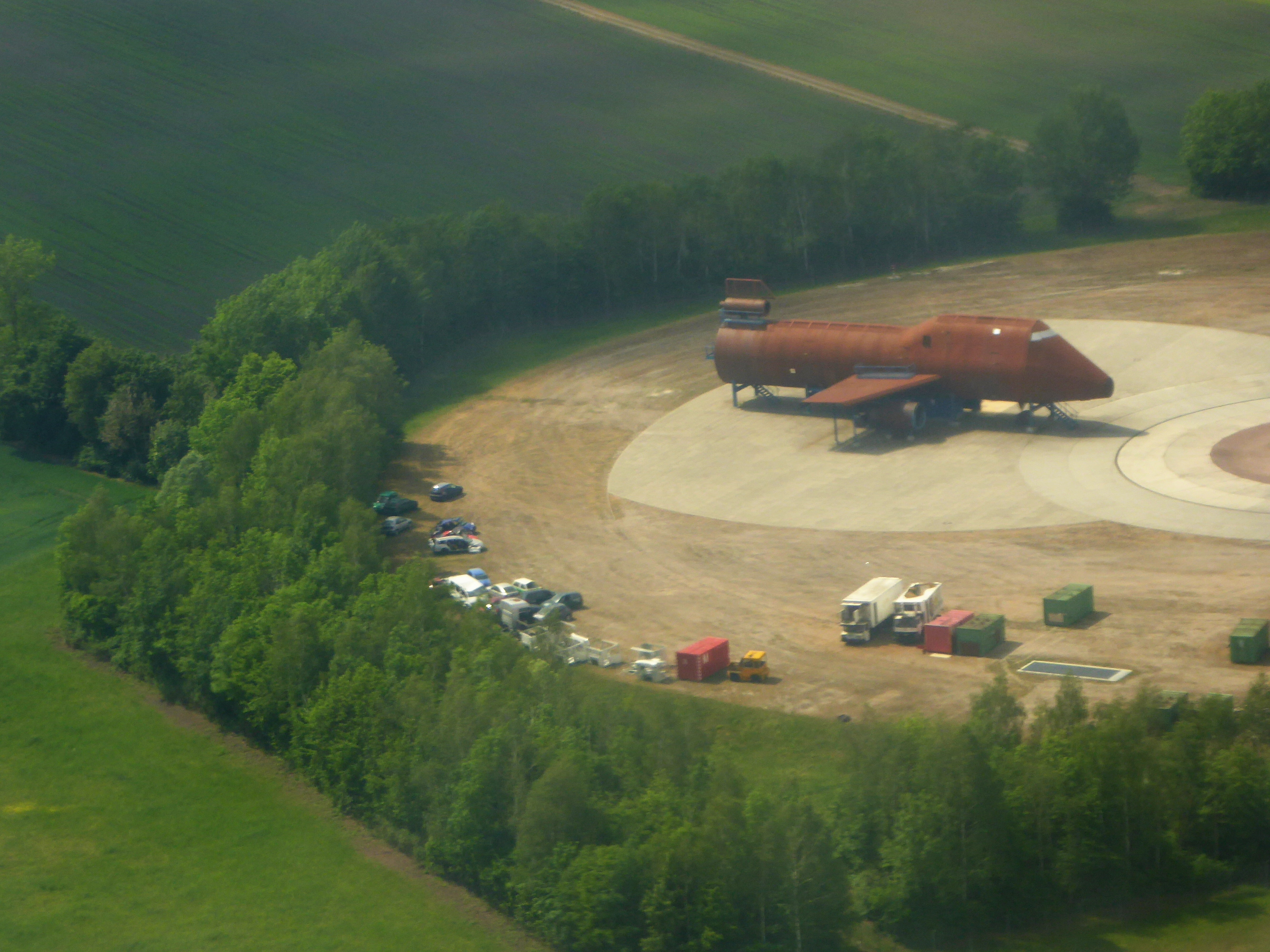 Flughafen München, Übungsgelände der Flughafenfeuerwehr.